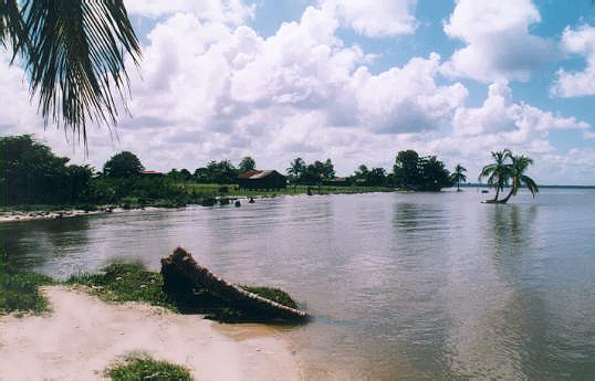 Pearl Lagoon on a sunny day.